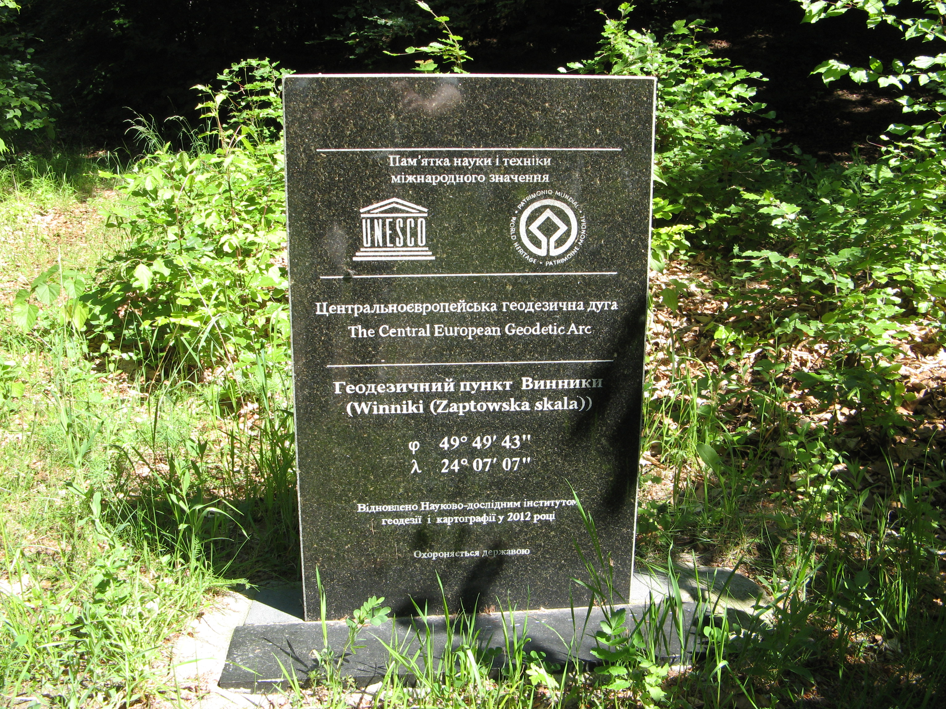 Геодезичний пункт Винники (Україна, Львівська обл.)